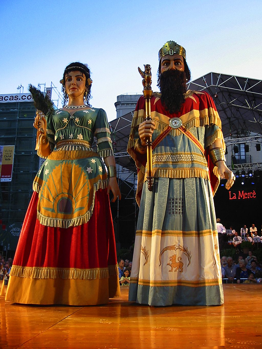 Gigantes en la Fiesta de La Mercè, Barcelona. España.